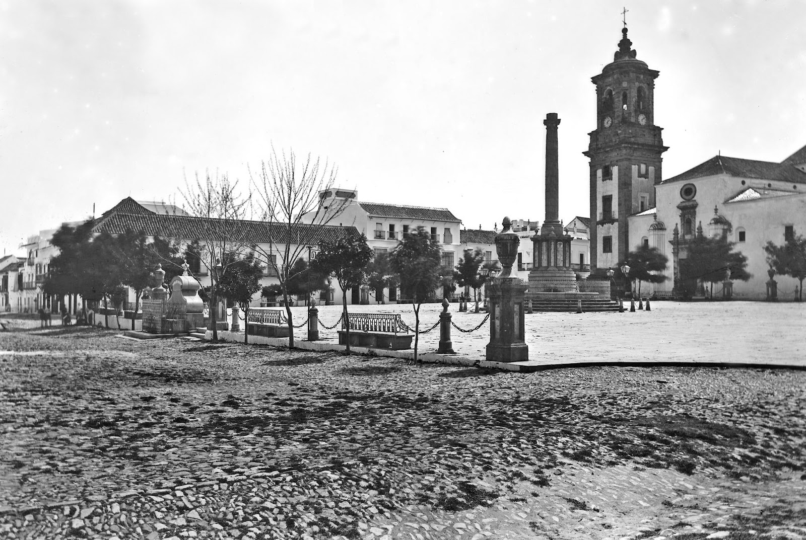 Plaza Alta Algeciras - Photograph by George Washington Wilson taken in the 1870-1890s in Campo de Gibraltar in Southern Spain just north of Gibraltar. Pictures found by Neville Chipolina